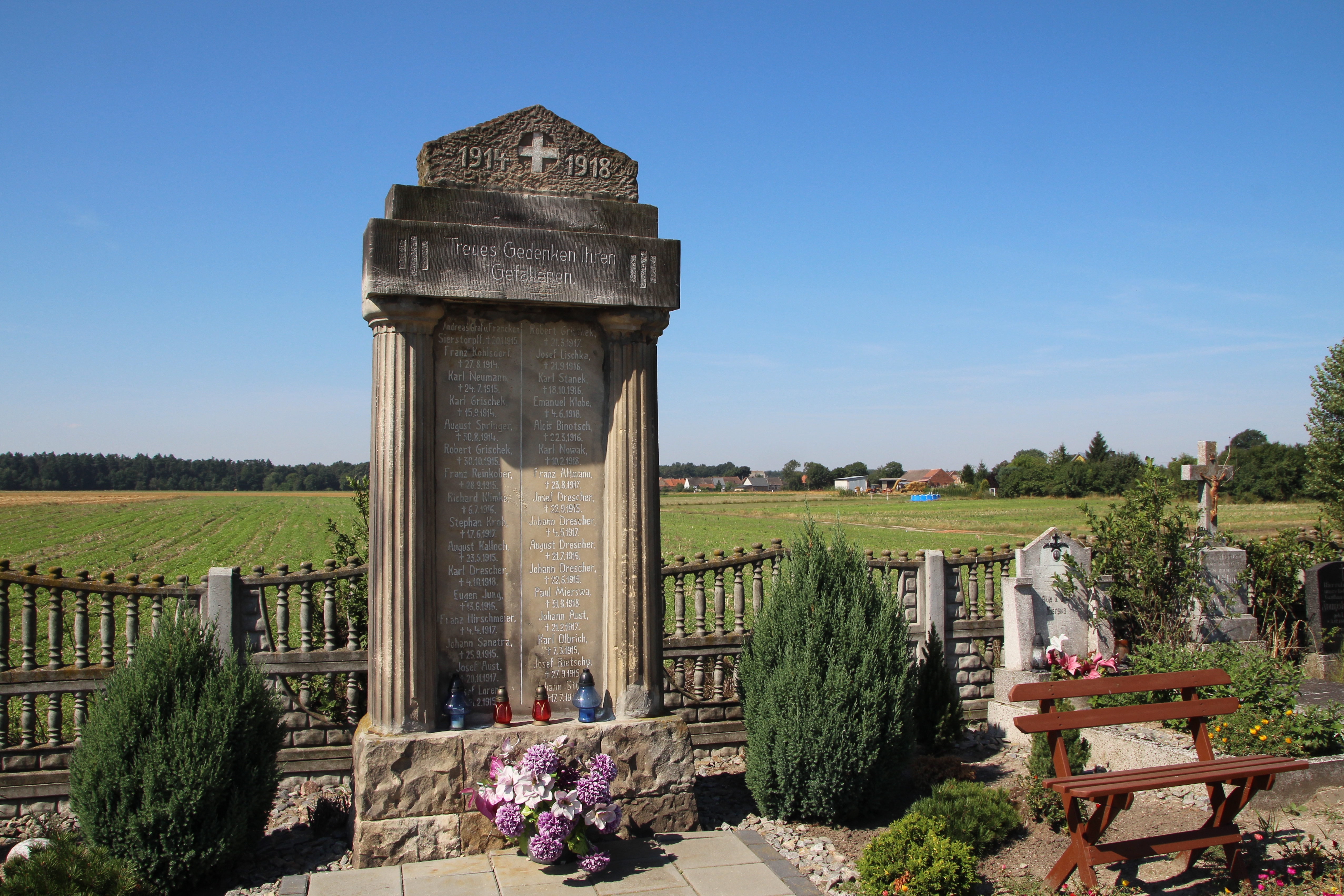 Puszyna – wieś w Polsce położona w województwie opolskim, w powiecie nyskim, w gminie Korfantów.